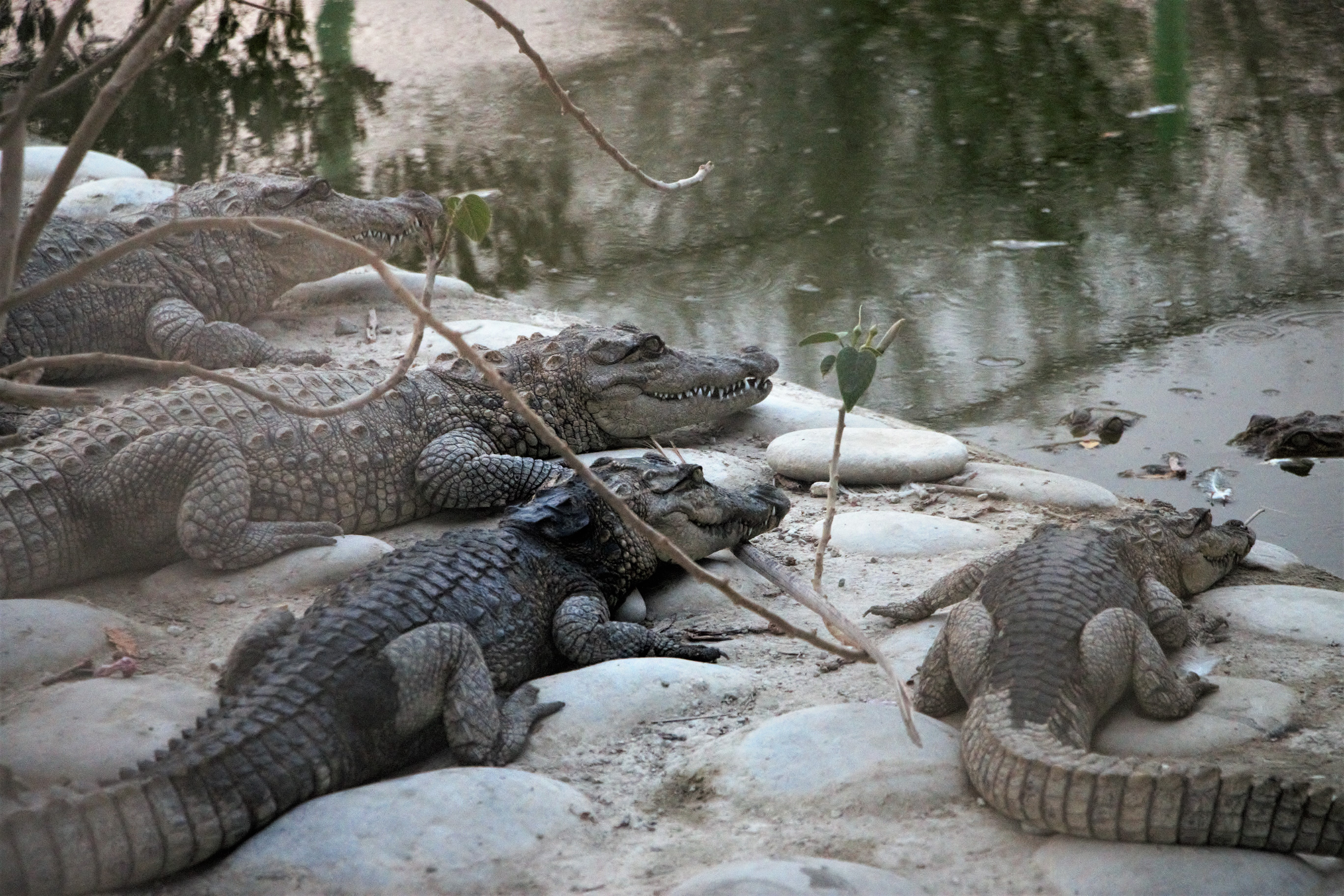 عکس از محمدامین نوبهار محل عکاسی: مرکز تحقیقات محیط زیستی ریکوکش، شهر راسک، بلوچستان، ایران